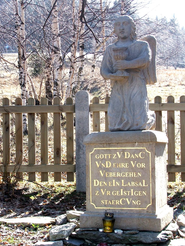 Góra Oliwna w Bolesławowie (Dolny Śląsk, Polska) – anioł